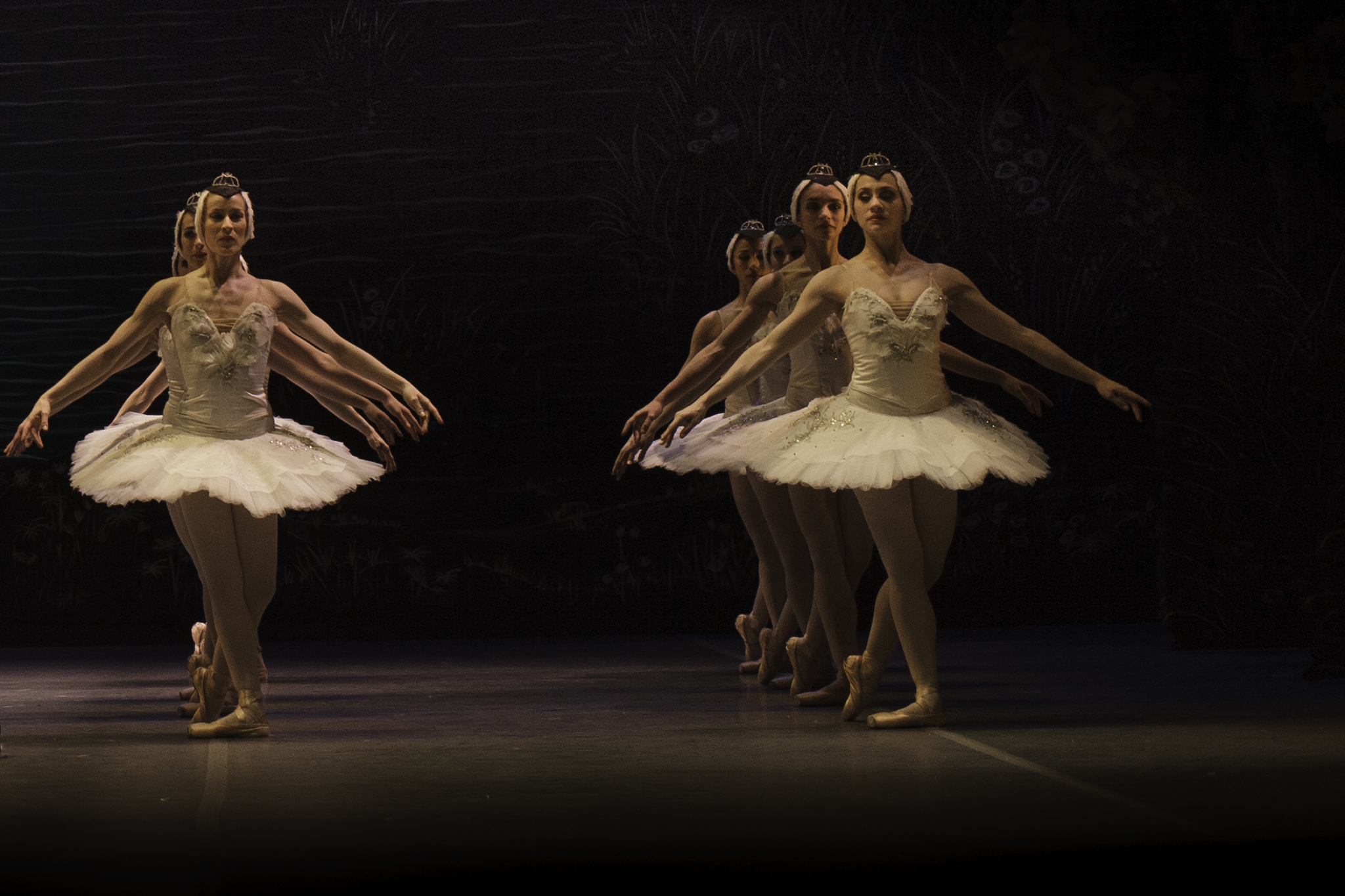 EL LAGO DE LOS CISNES | Ballet Nacional Sodre Director: Julio Bocca Coreografía: Raúl Candal 8 al 21 de Agosto de 2013 Auditorio Sodre, Montevideo, Uruguay Camera: Canon EOS 5D Mark II Lens: Zeiss Planar T* 1.4/50 ZE 0 ISO: 800